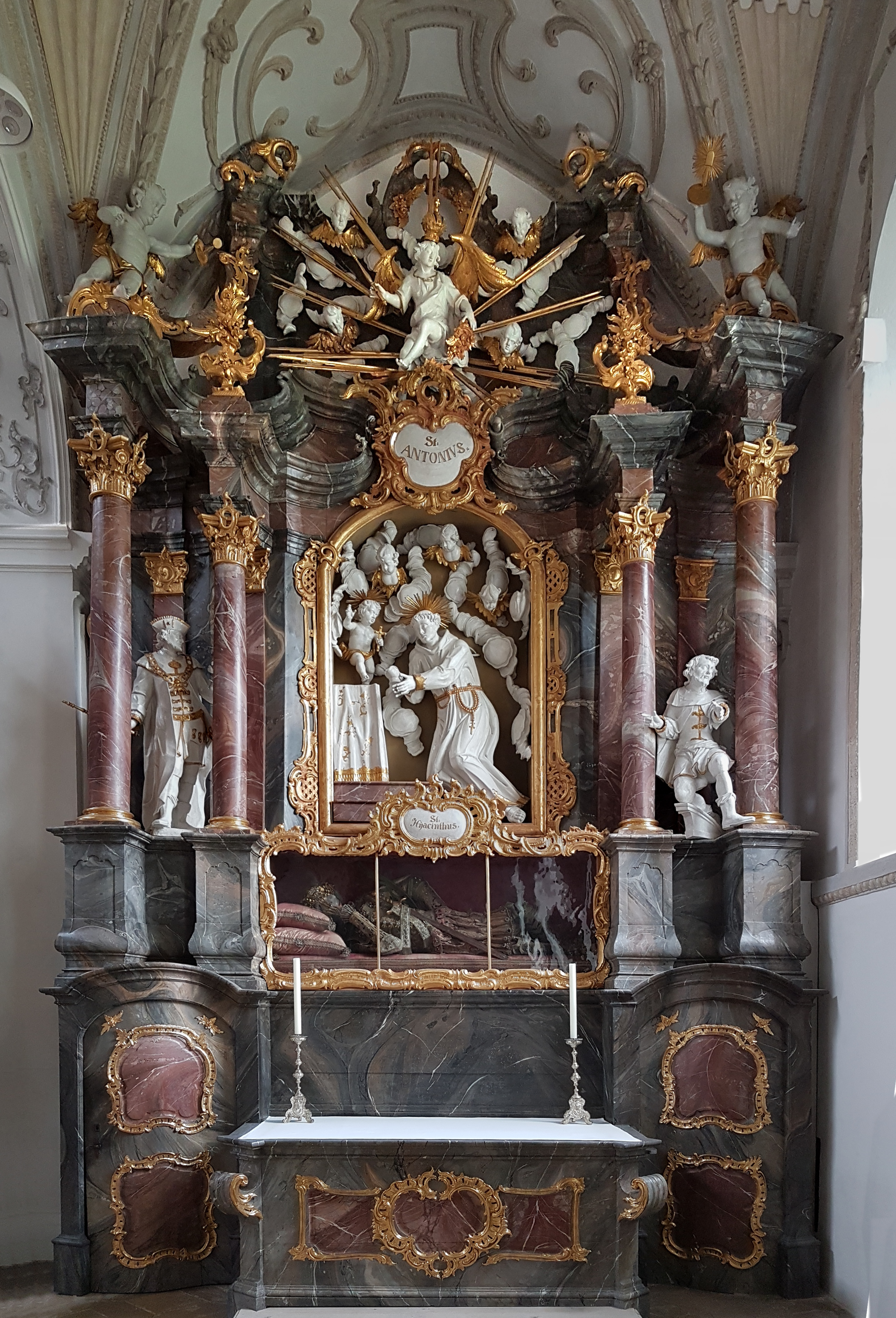 Stiftskirche St. Johannes d. T. (Steingaden)